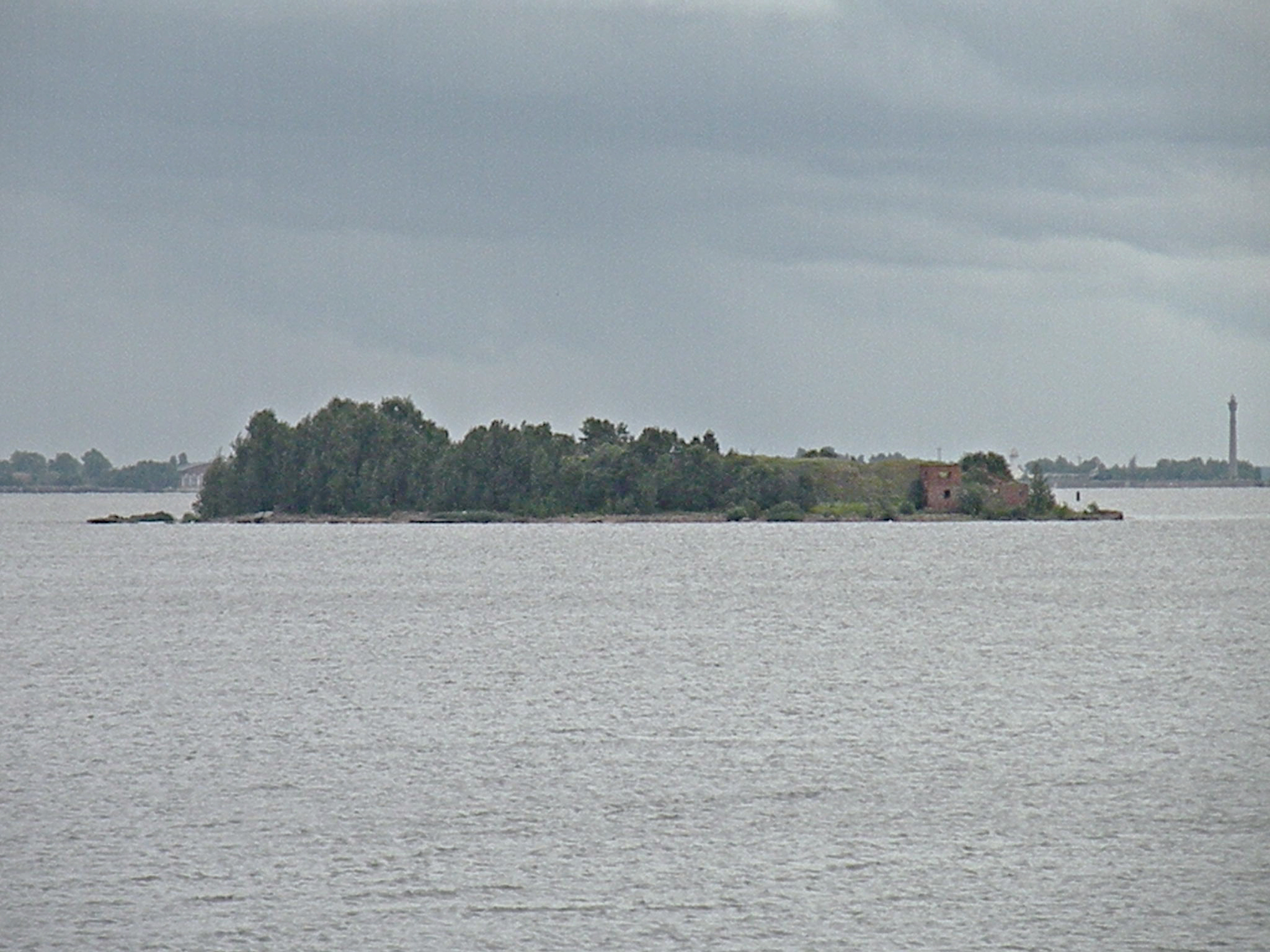 Fort_Nr._2._Kronstadt.